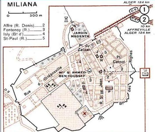 Plan Ancien de la ville de Miliana en Algérie , vers les Années 50 .